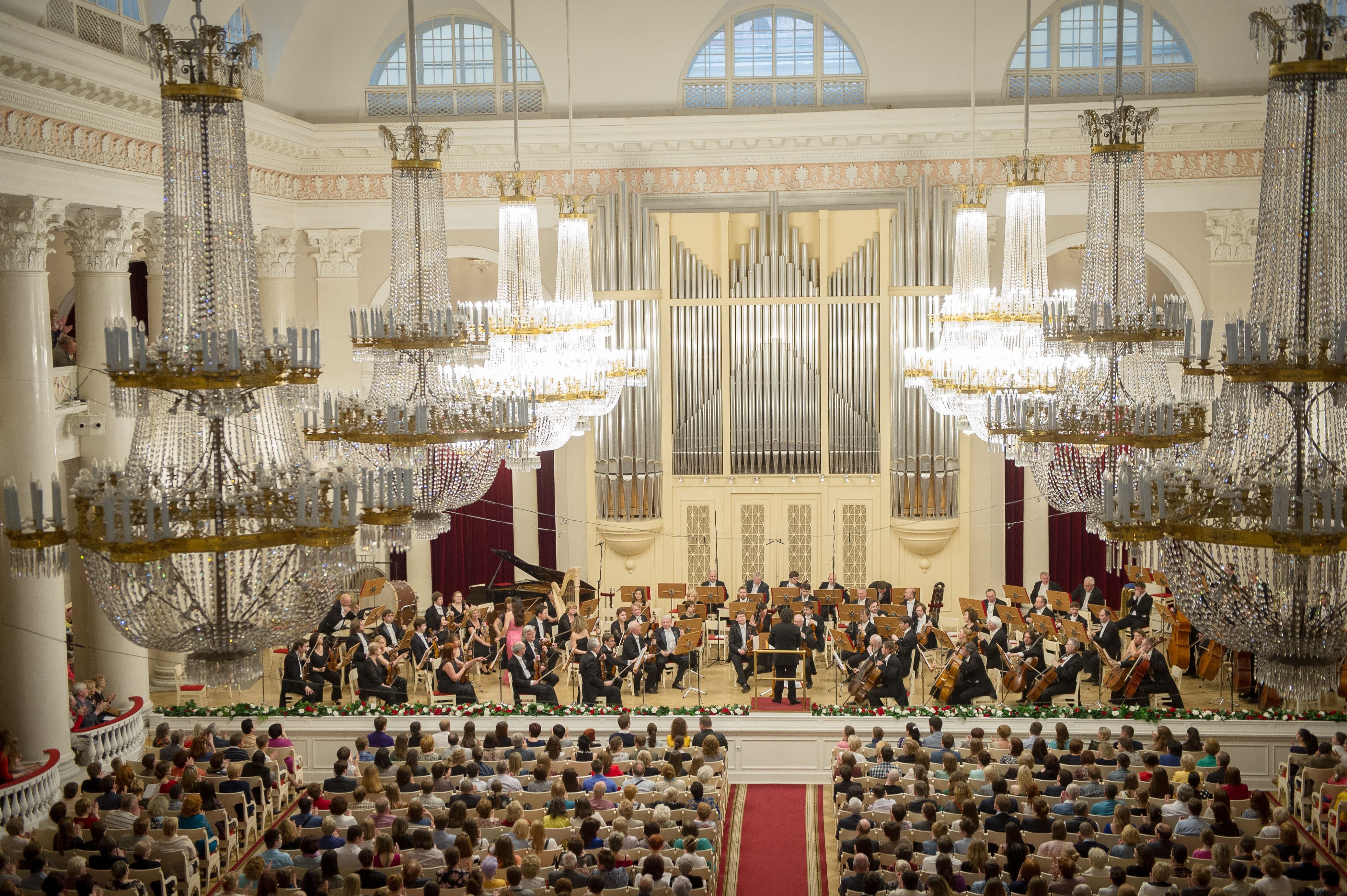 San Petersburgo, 6 de junio de 2015 - El tenor Darío Volonté junto a la soprano Marina Silva presentaron un concierto de Gala de Ópera en el Teatro de la Filarmónica de San Petersburgo como parte de las jornadas de intercambio cultural bilateral que se están llevando a cabo entre ambos países.